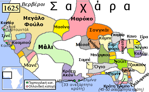 Χάρτης της Δυτικής Αφρικής το 1625 μ.Χ.